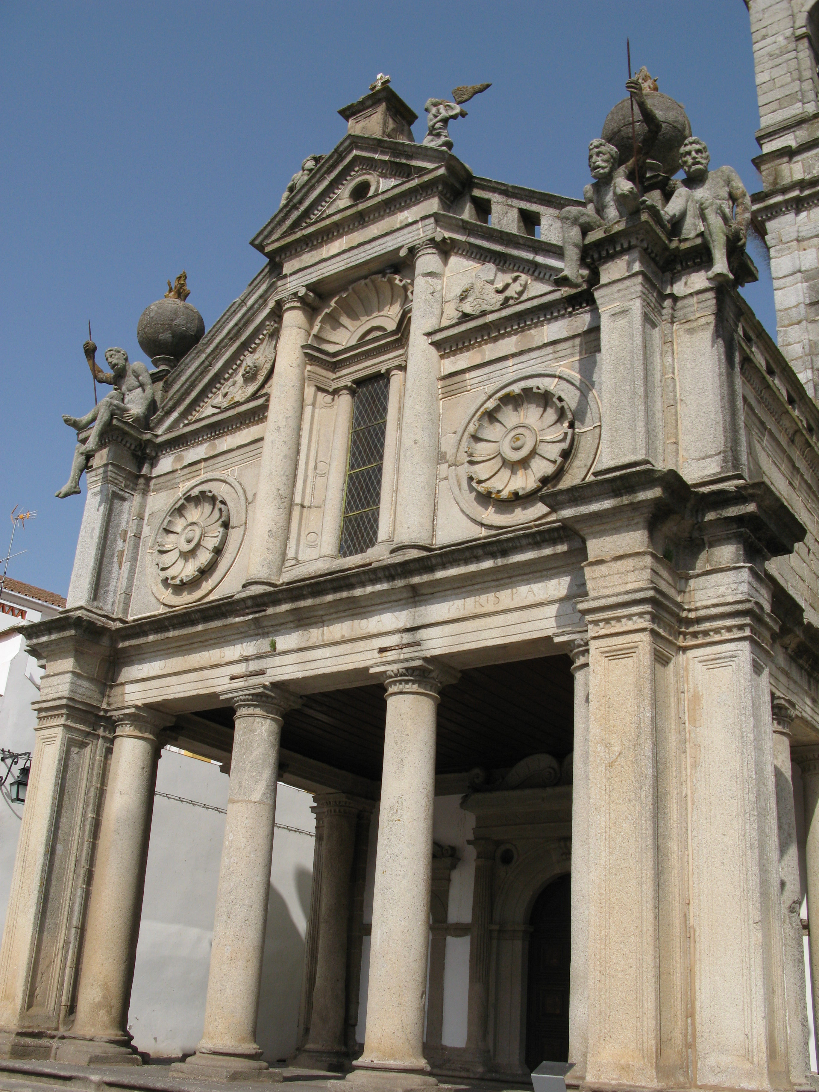 Renaissance façade of Graça Church in Evora, Portugal